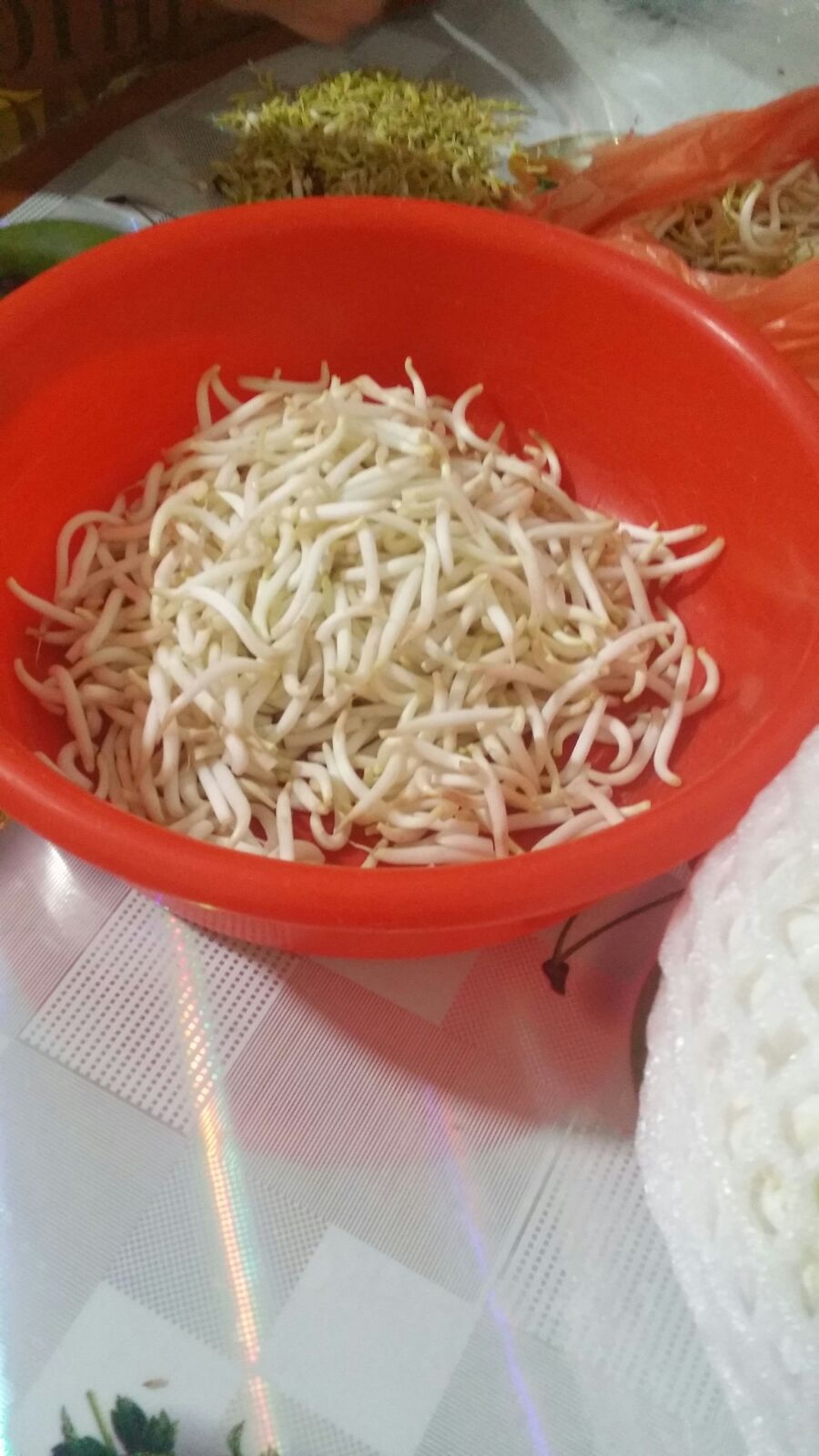 中文（中国大陆）: 东南亚豆芽